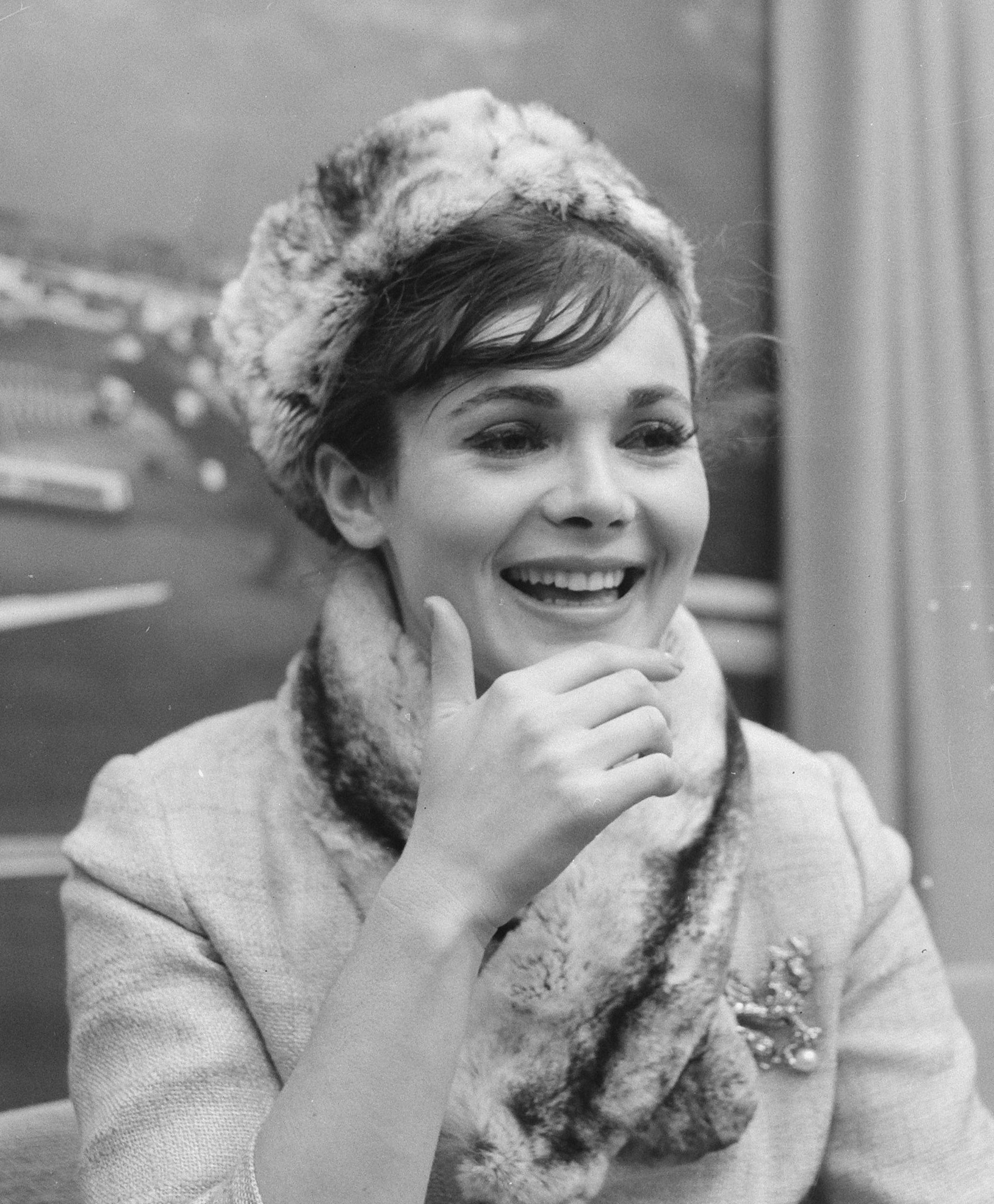 Gila Golan (poolse filmster) op Schiphol